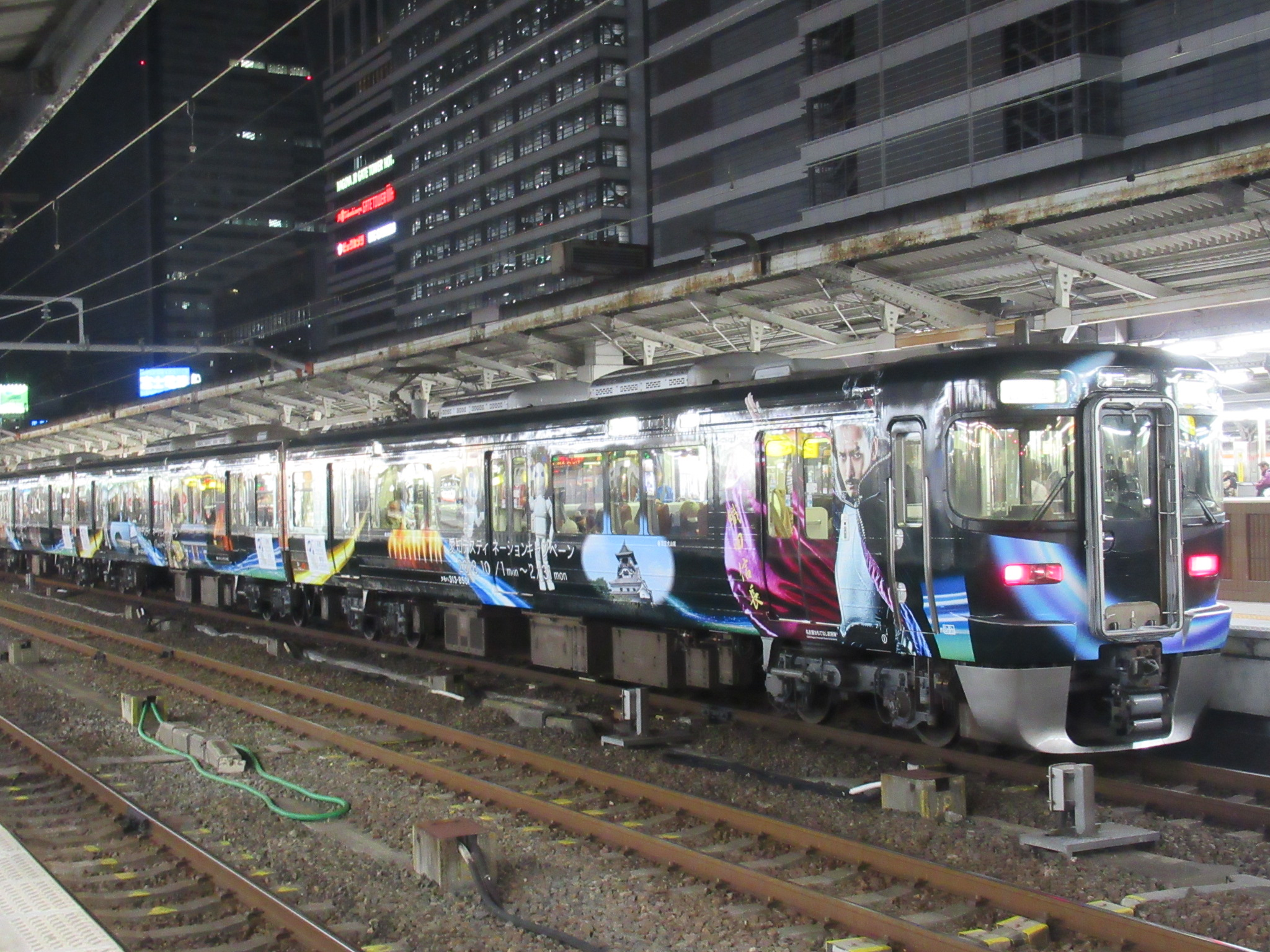 313系8000番台B201編成 名古屋おもてなし武将隊ラッピング電車 名古屋駅